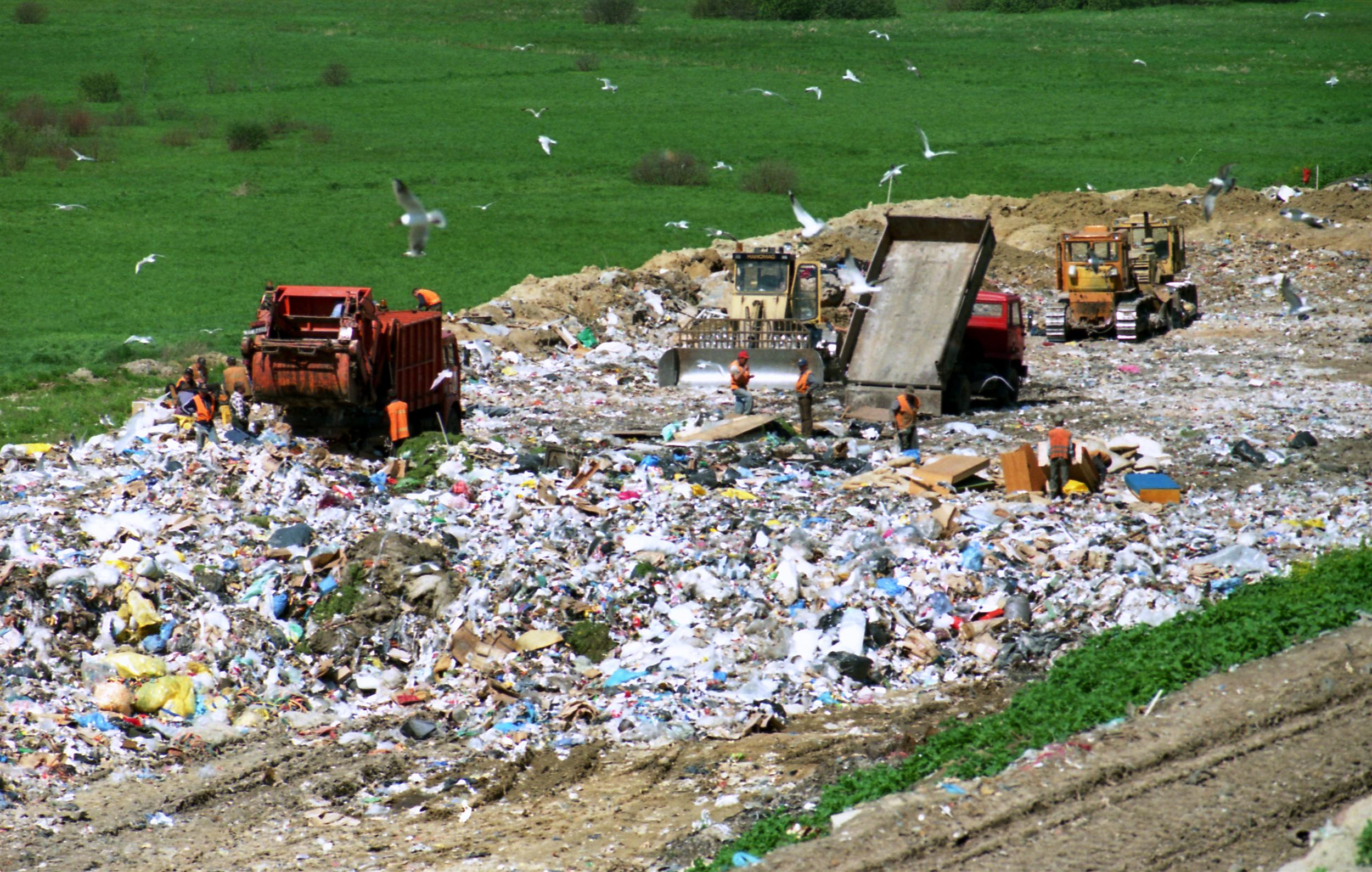 Wysypisko odpadów w Łubnej